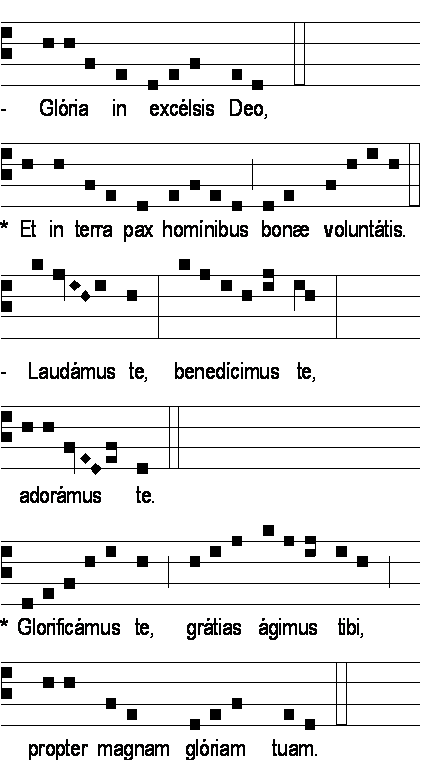 Début du "Gloria 5"